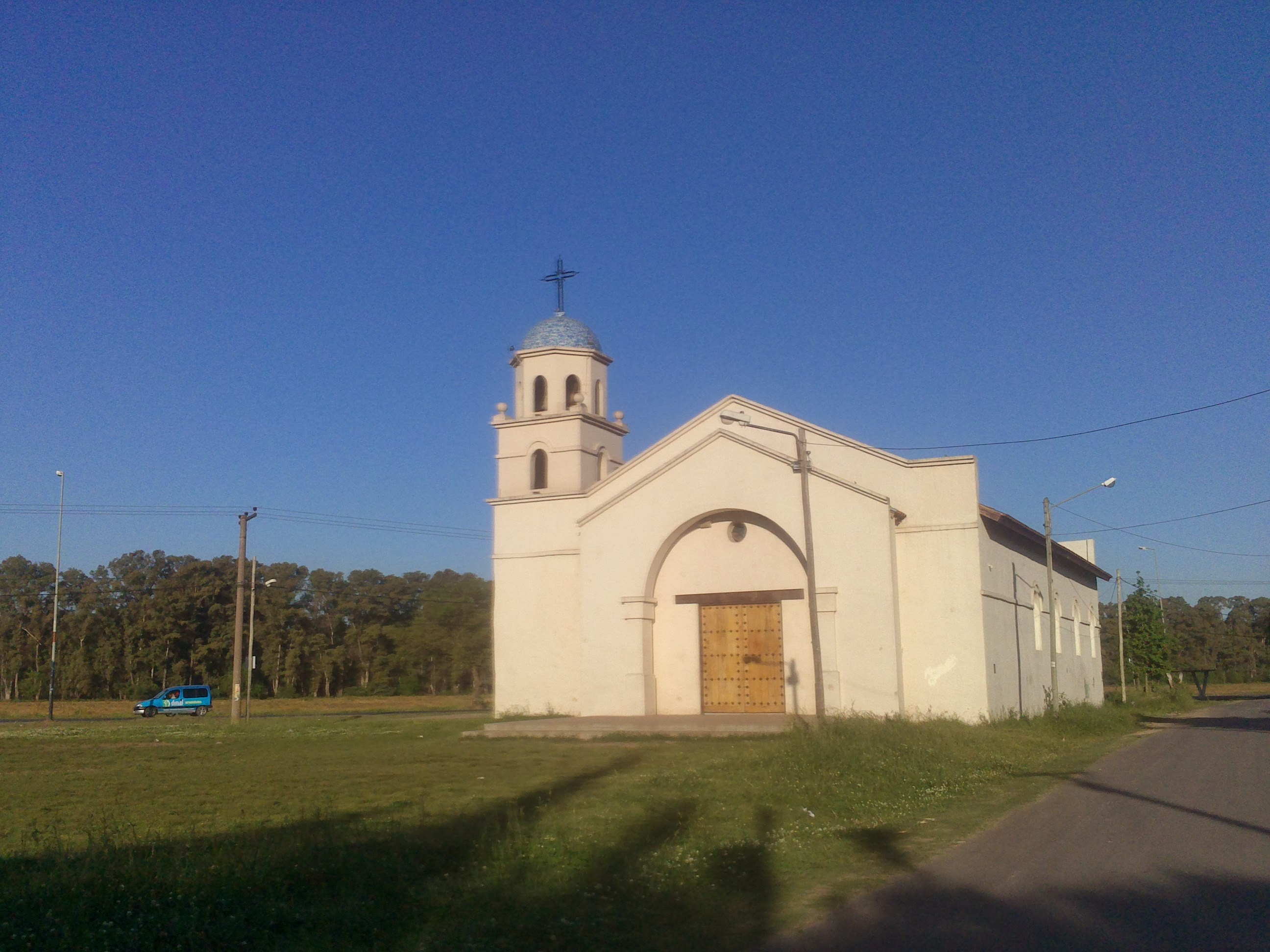 Parroquia - LM